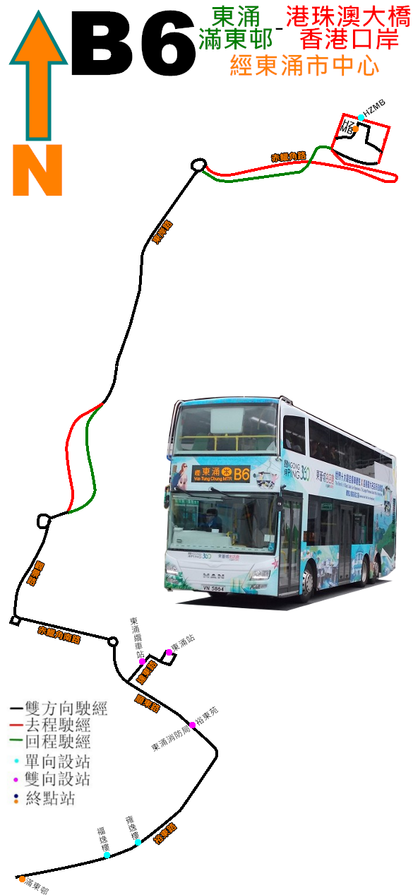 新大嶼山巴士B6線的走線圖